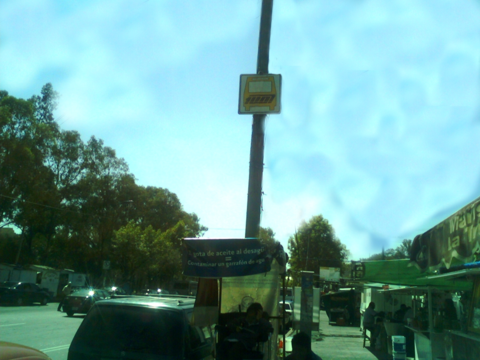 Letrero de la ruta cien